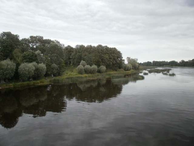 Vaade Via Baltica maanteesillalt Salatsi jõele ja linnuse asukohale.